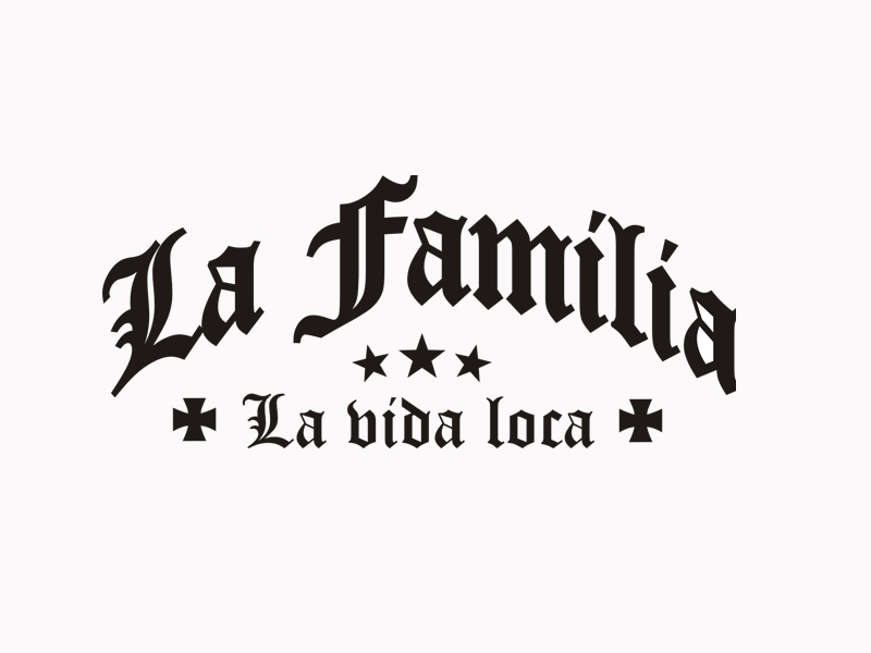 La Familia - la vida loca